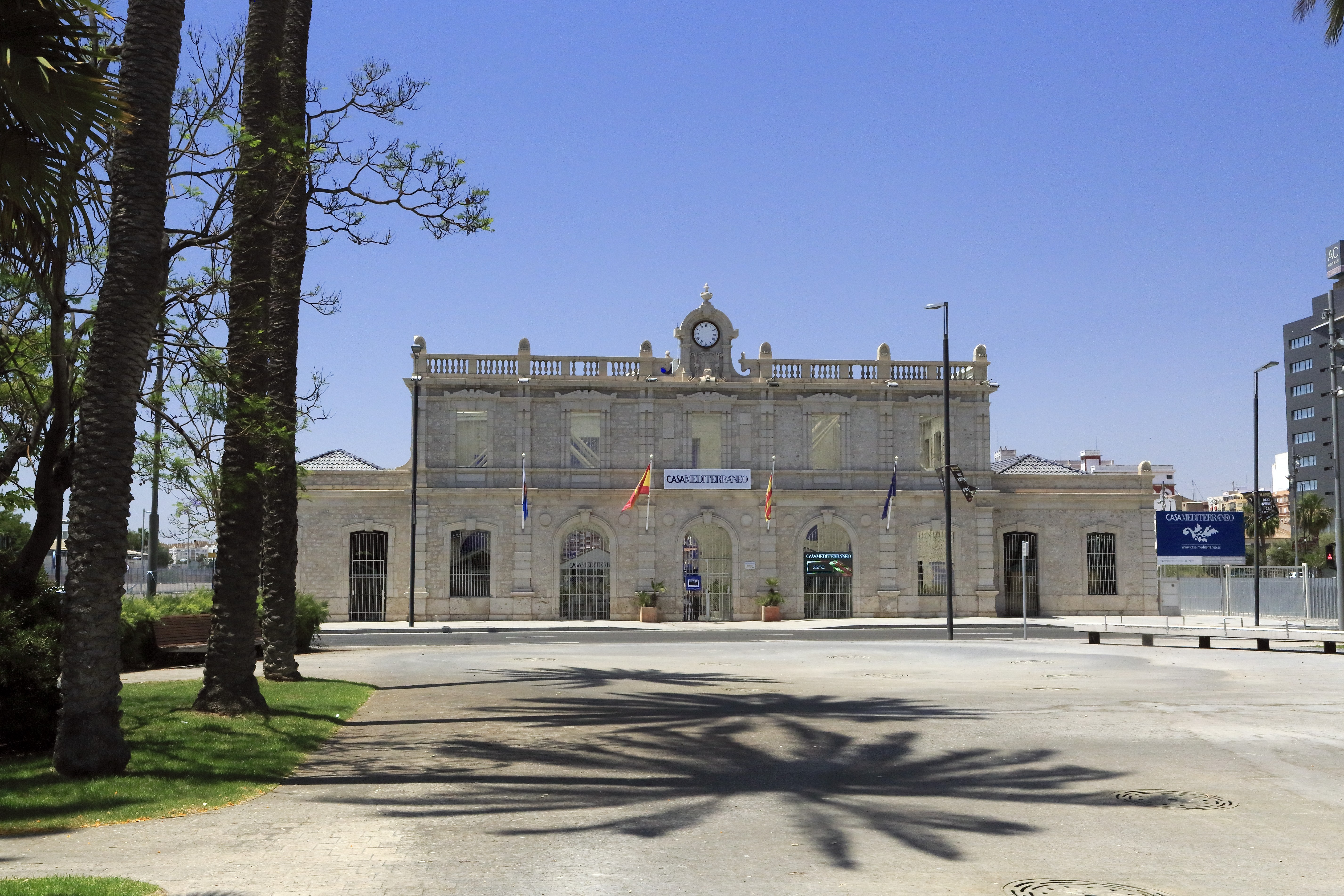 Empfangsgebäude des Bahnhofs Alicante-Benalúa an der Plaza Arquitecto Miguel López, ehemals Ausgangspunkt der Strecke Richtung Murcia, Lorca und Águilas. In den 1990er Jahren wurde die Strecke bis Alicante-San Gábriel verkürzt. Heute »Casa del Mediterráneo«